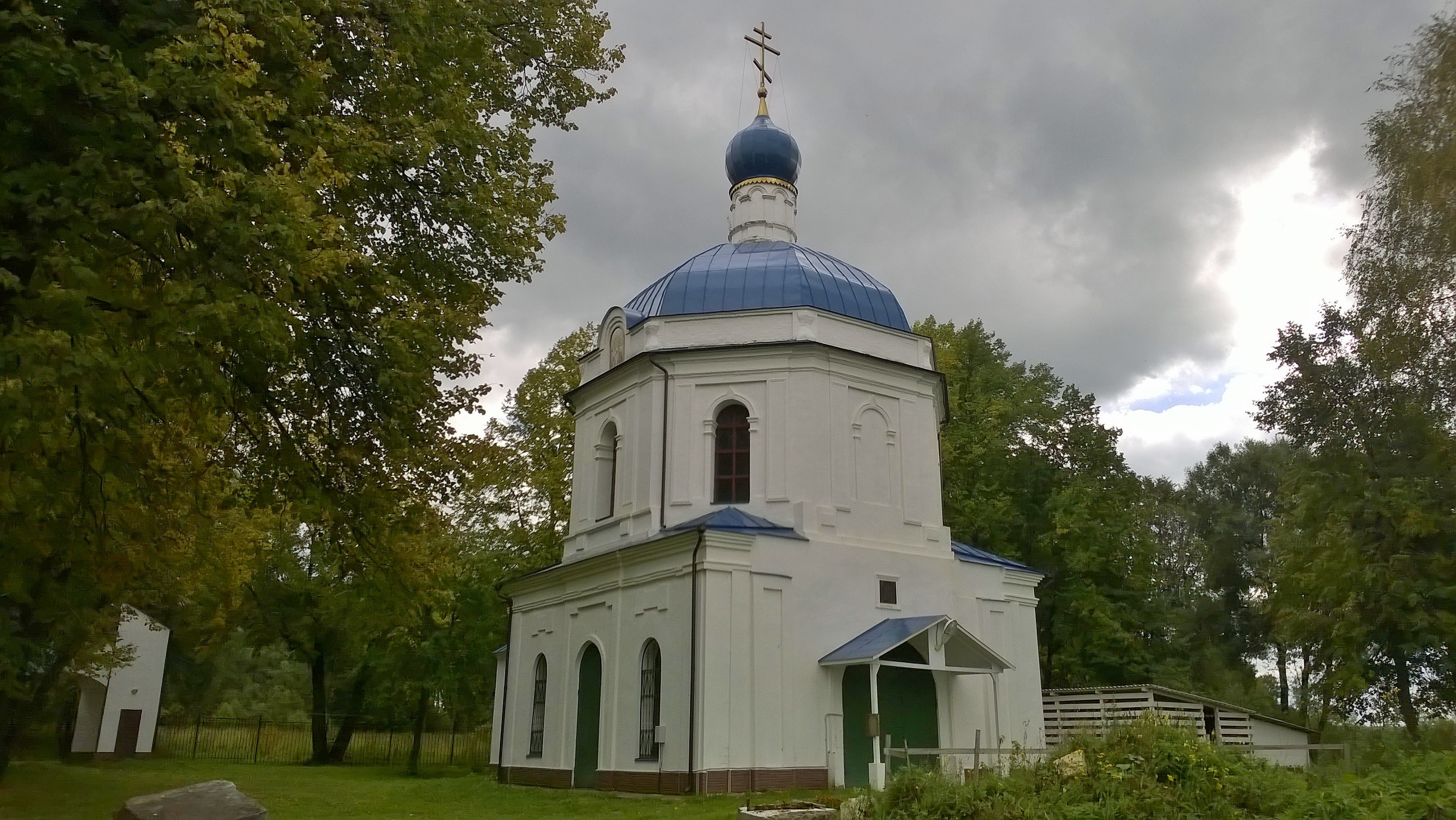 Храм Воскресения Христова в Ботове, Волоколамский район, Московская область, Россия